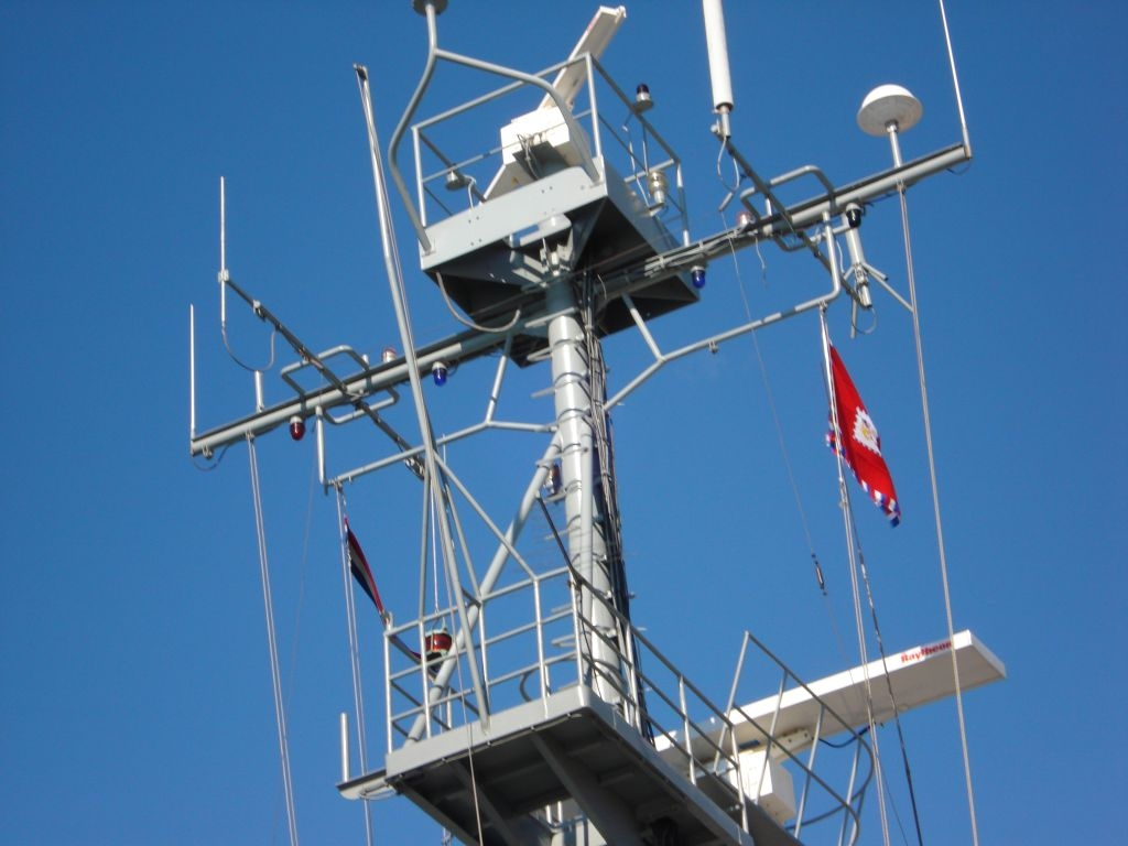 BS-73 Faust Vrančić